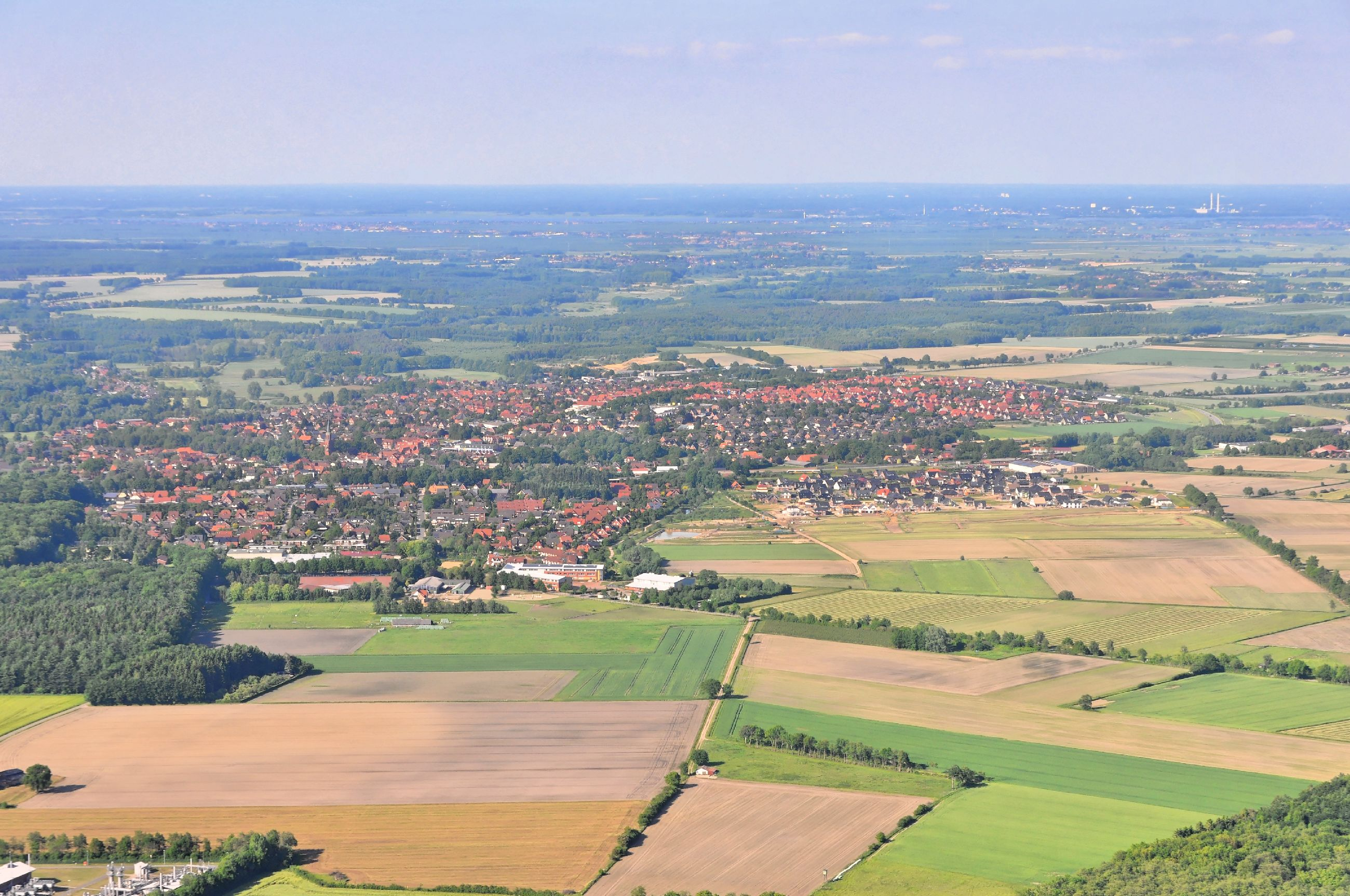 Überführungsflug vom Flugplatz Nordholz-Spieka über Lüneburg, Potsdam zum Flugplatz Schwarzheide-Schipkau